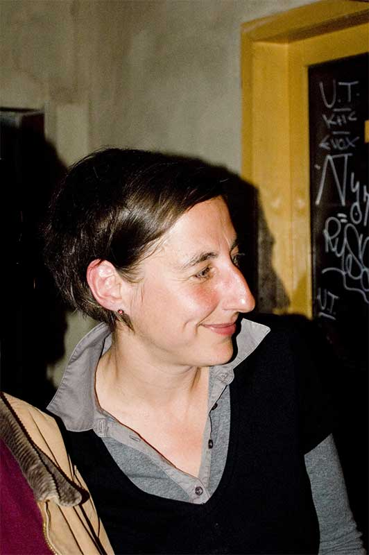 Judith Hermann am 24. April 2007 im Kaffee Burger (Berlin-Mitte) bei der Benefiz-Lesung Krankenhaus später für Michael Stein